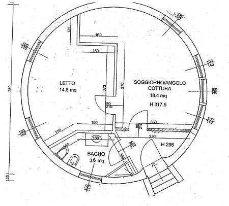 Milano, pianta di una delle case a igloo alla Maggiolina, opera dell'architetto Mario Cavallè